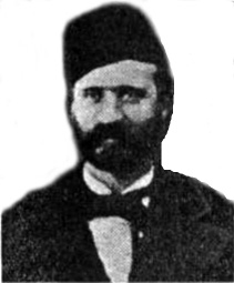 דיוקנו של נסים בכור אלחדף